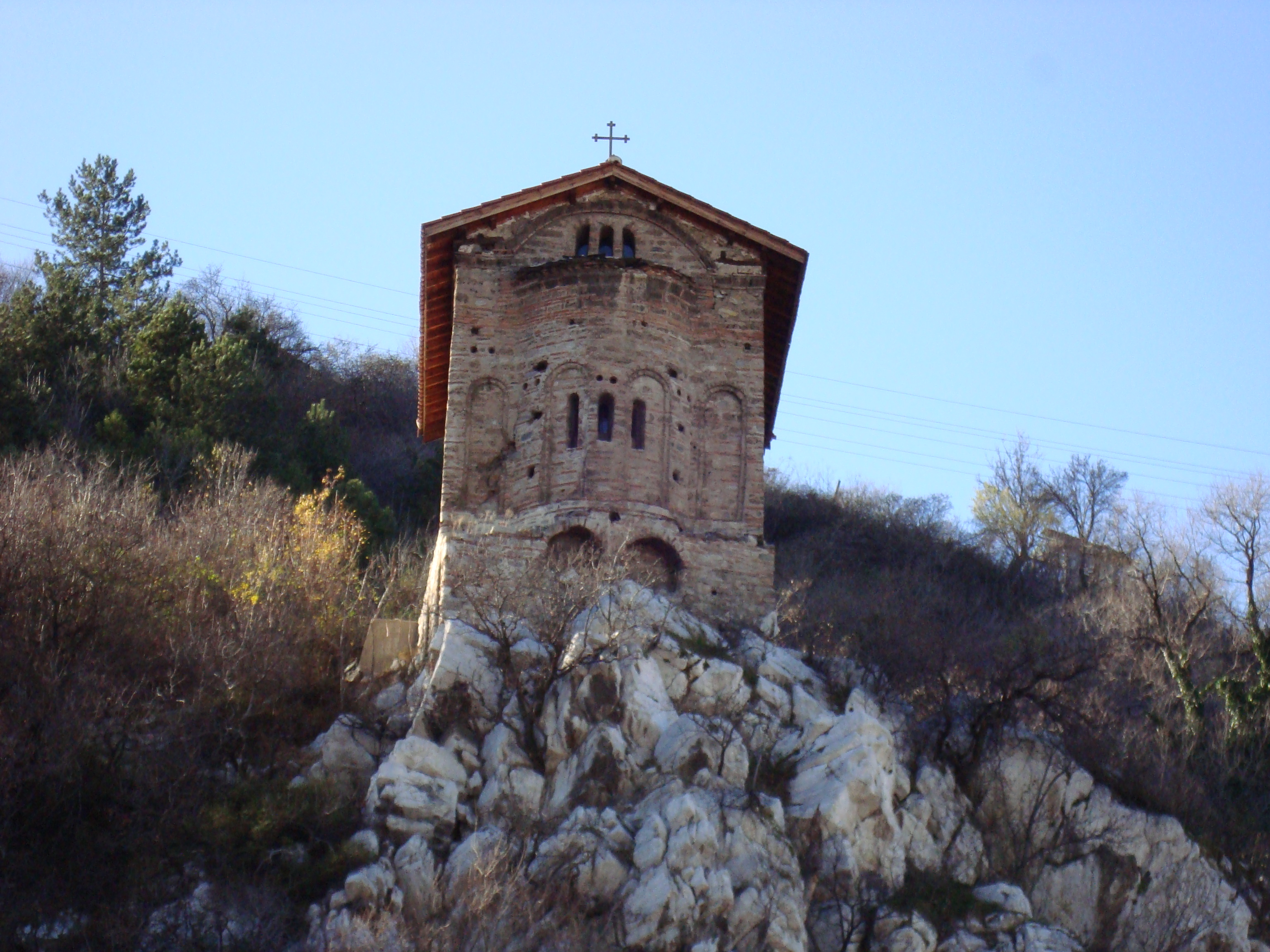 Параклис "Свети Ян", Асеновград